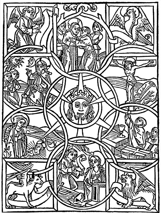 Holzschnitt nach dem Meditationsbild des hl. Niklaus von der Flüe im Pilgertraktat